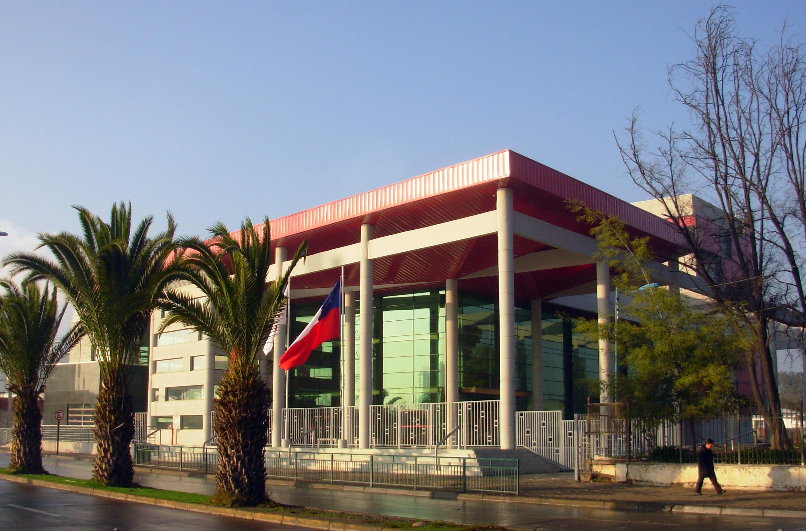 Teatro Regional de Rancagua, Chile.